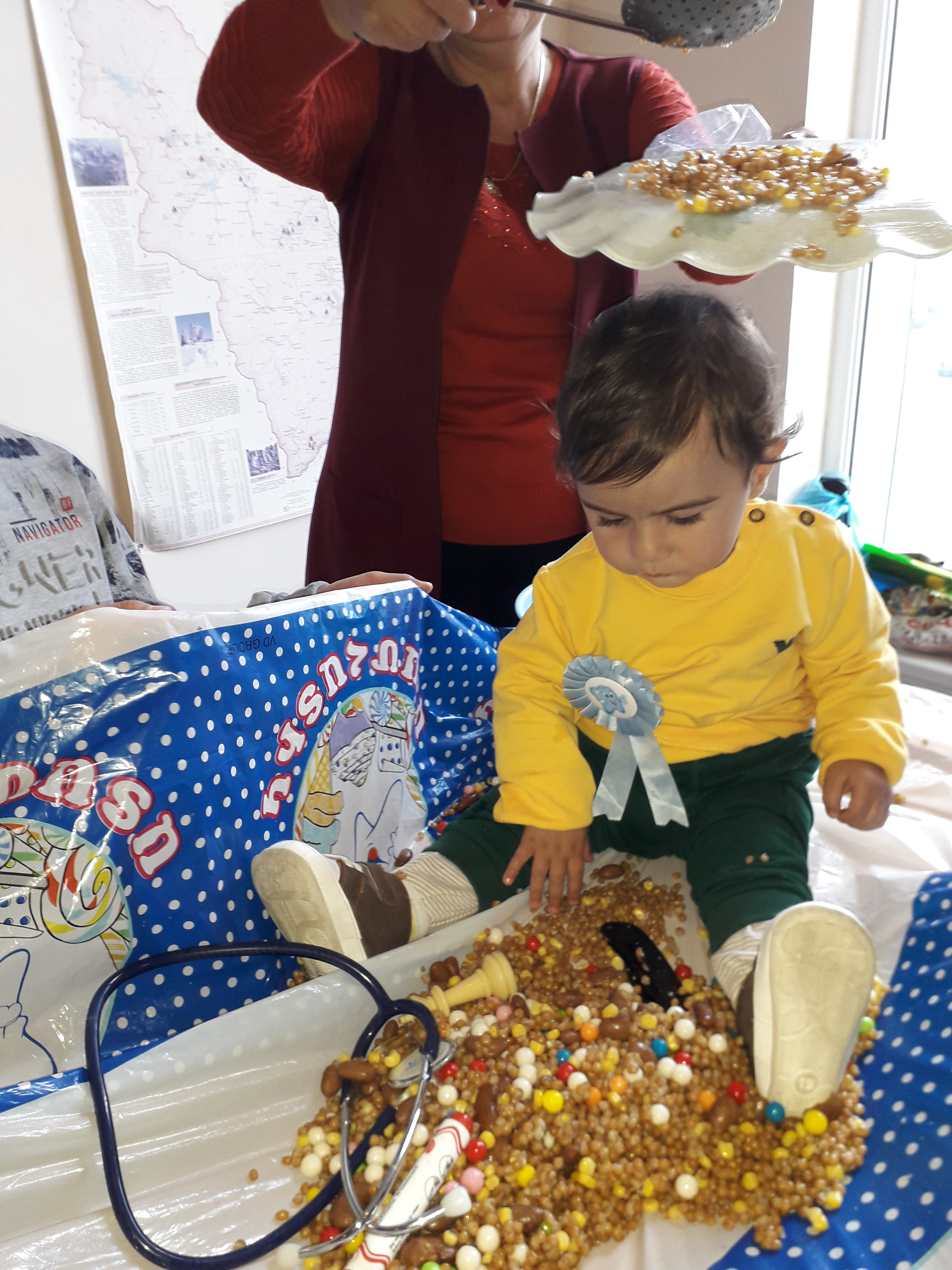 Ատամհատիկ, ակռահատիկ, ատամնահատիկ, կաճախաշ